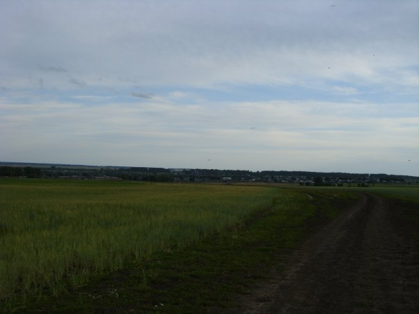 Небо над Климово Ибресинского района